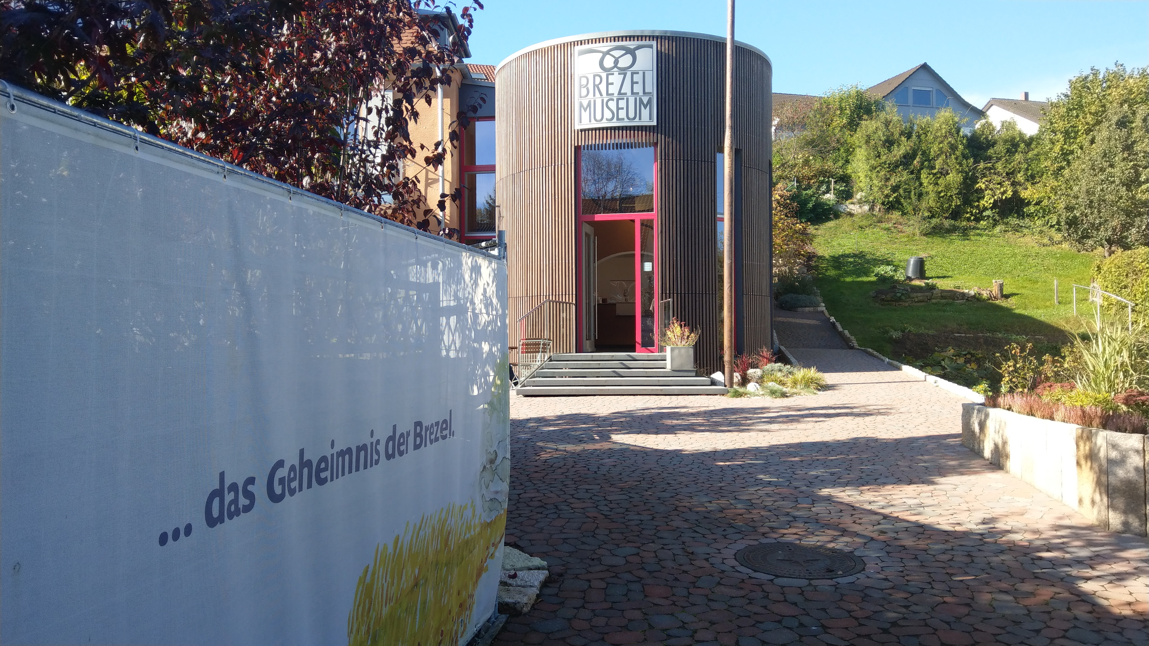 Brezel Museum Erdmannhausen